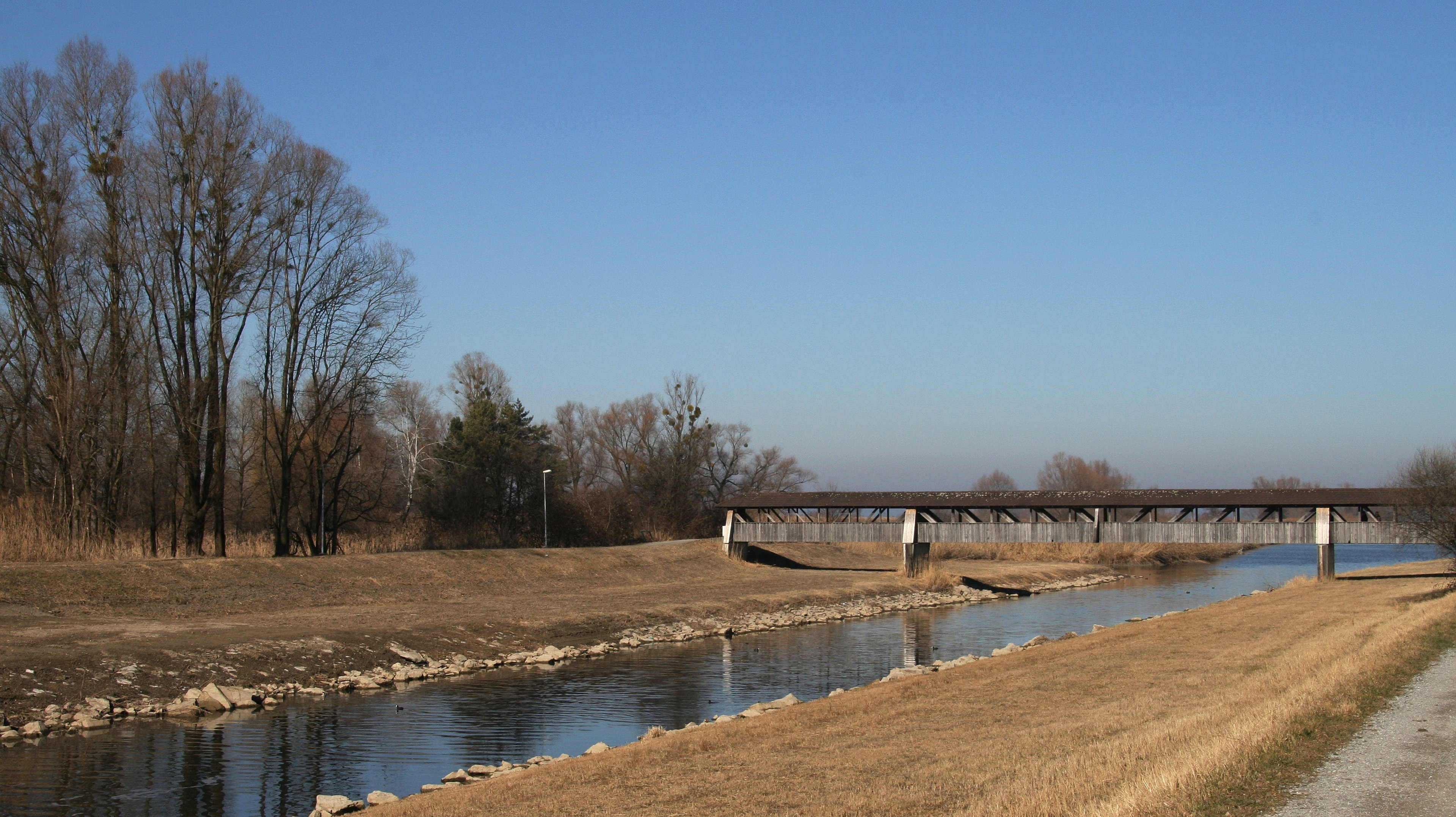 Die Dornbirner Ach im letzten Teilstück vor dem Bodensee in Hard. Eine gedeckte Holzbrücke führt die Fussgänger zum rechten Rheindamm.